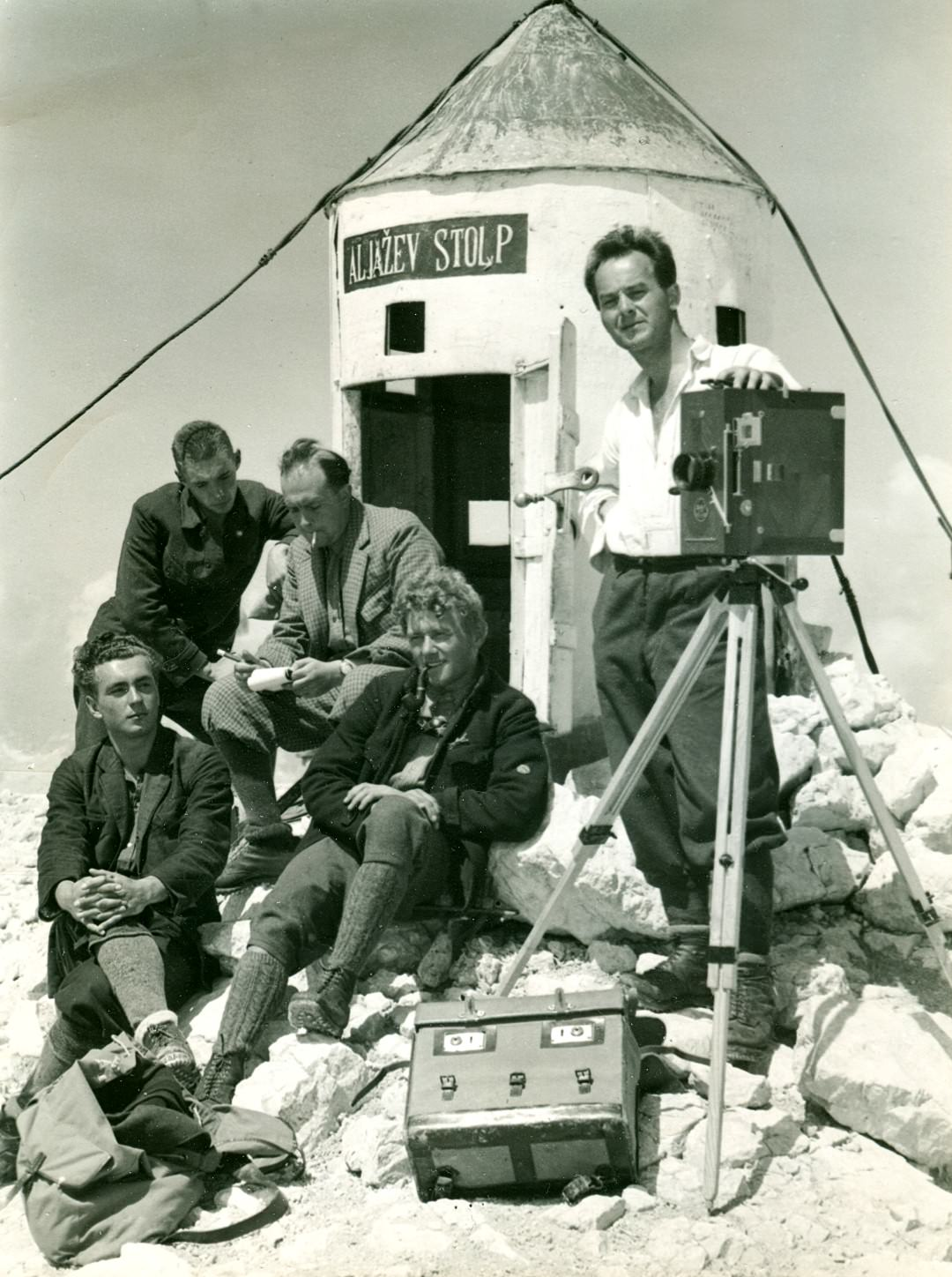 Skalaška filmska ekipa na Triglavu.